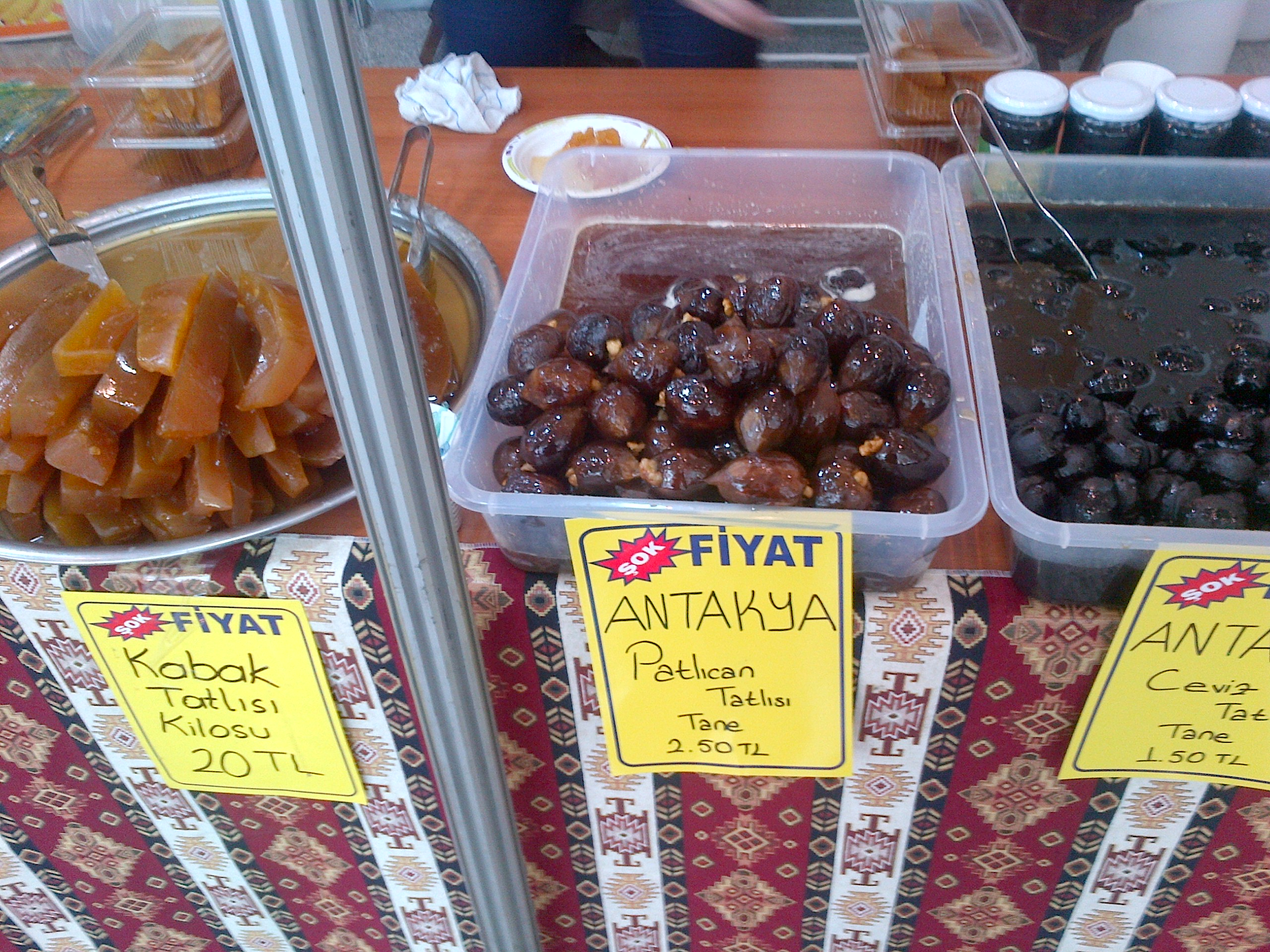 Dulces de berenjena y calabaza, de la cocina de Hatay en Turquia.